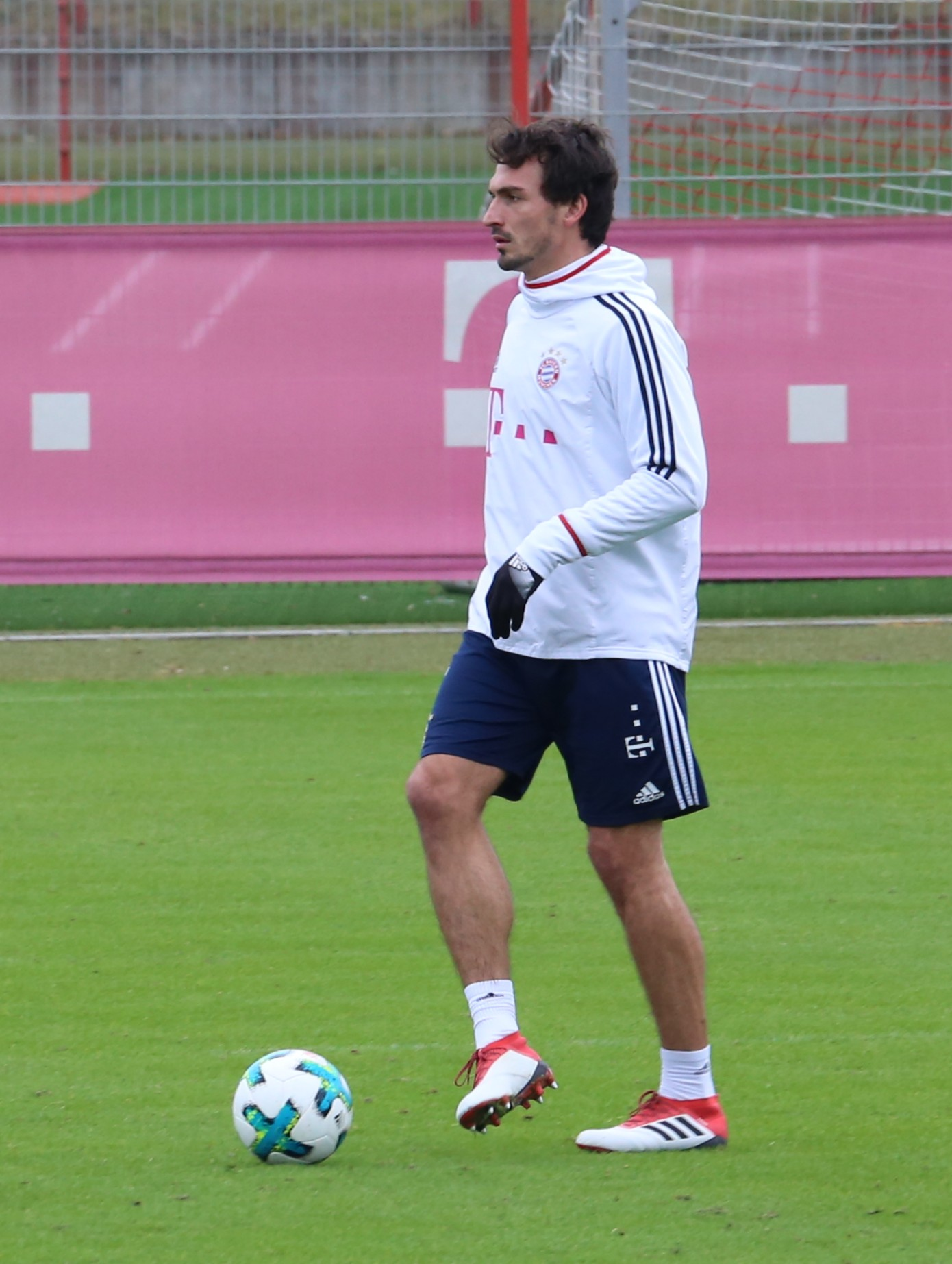 Mats Hummels beim Training auf dem Gelände des FC Bayern München (Januar 2018)